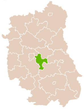 Map of Świdnik county, Lublin voivodship Mapa powiatu świdnickiego, województwo lubelskie